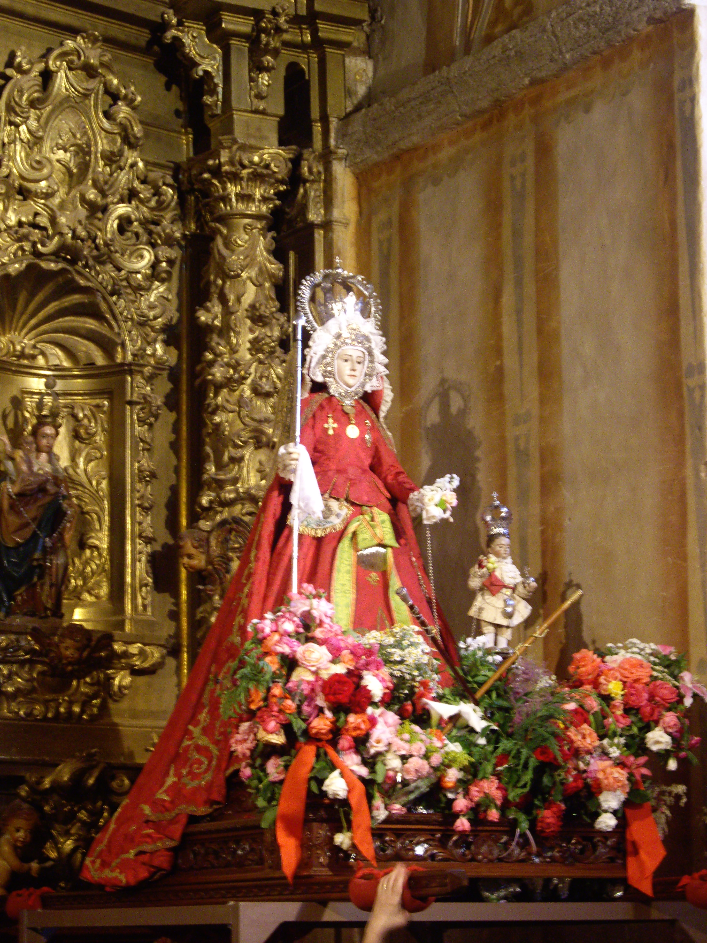 Virgen de la Concha de Zamora en sus andas en la Iglesia de la Hiniesta durante su romeria de 2011